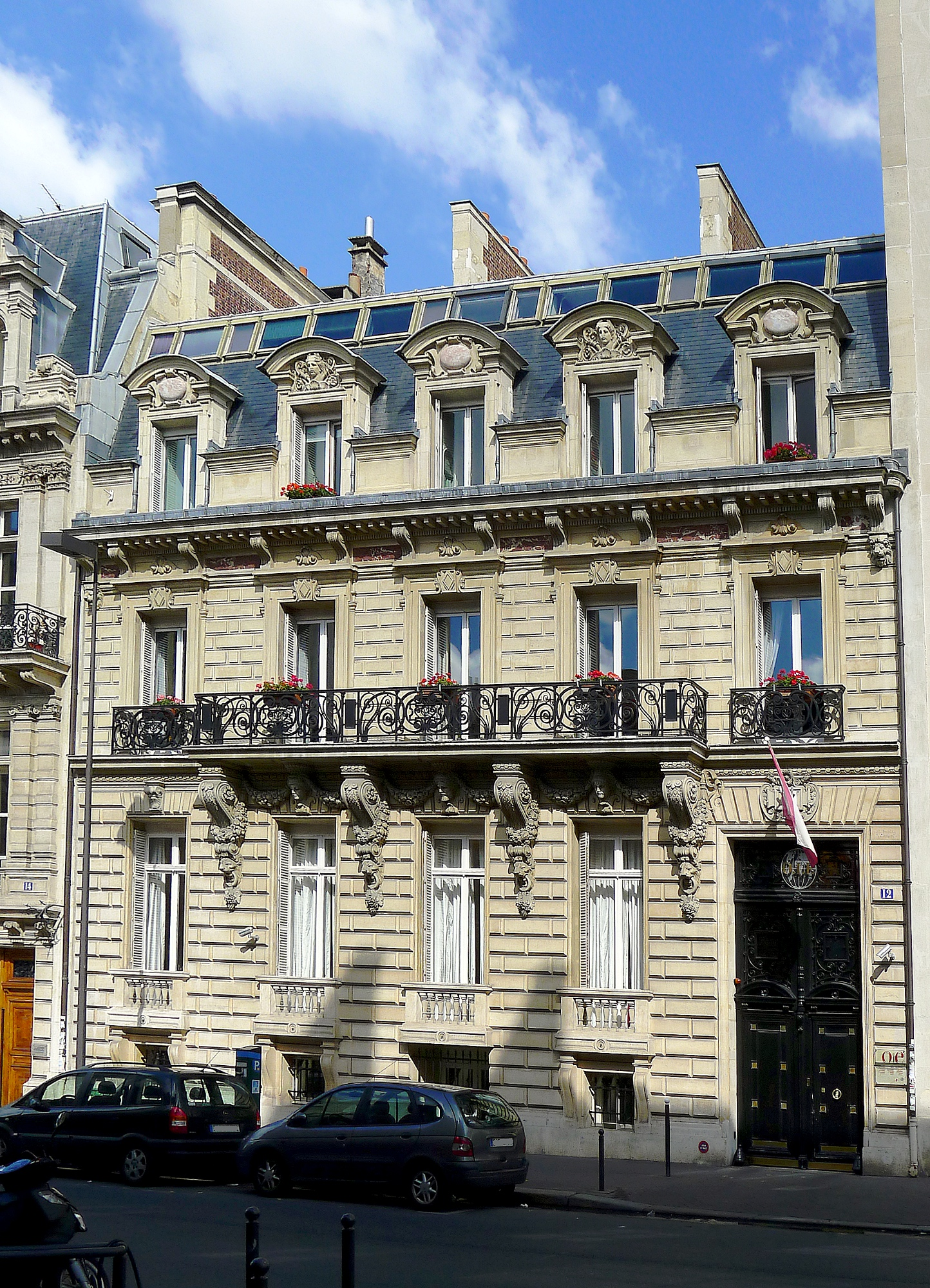 Rue de Prony - Paris XVII N°12 : office international des épizooties